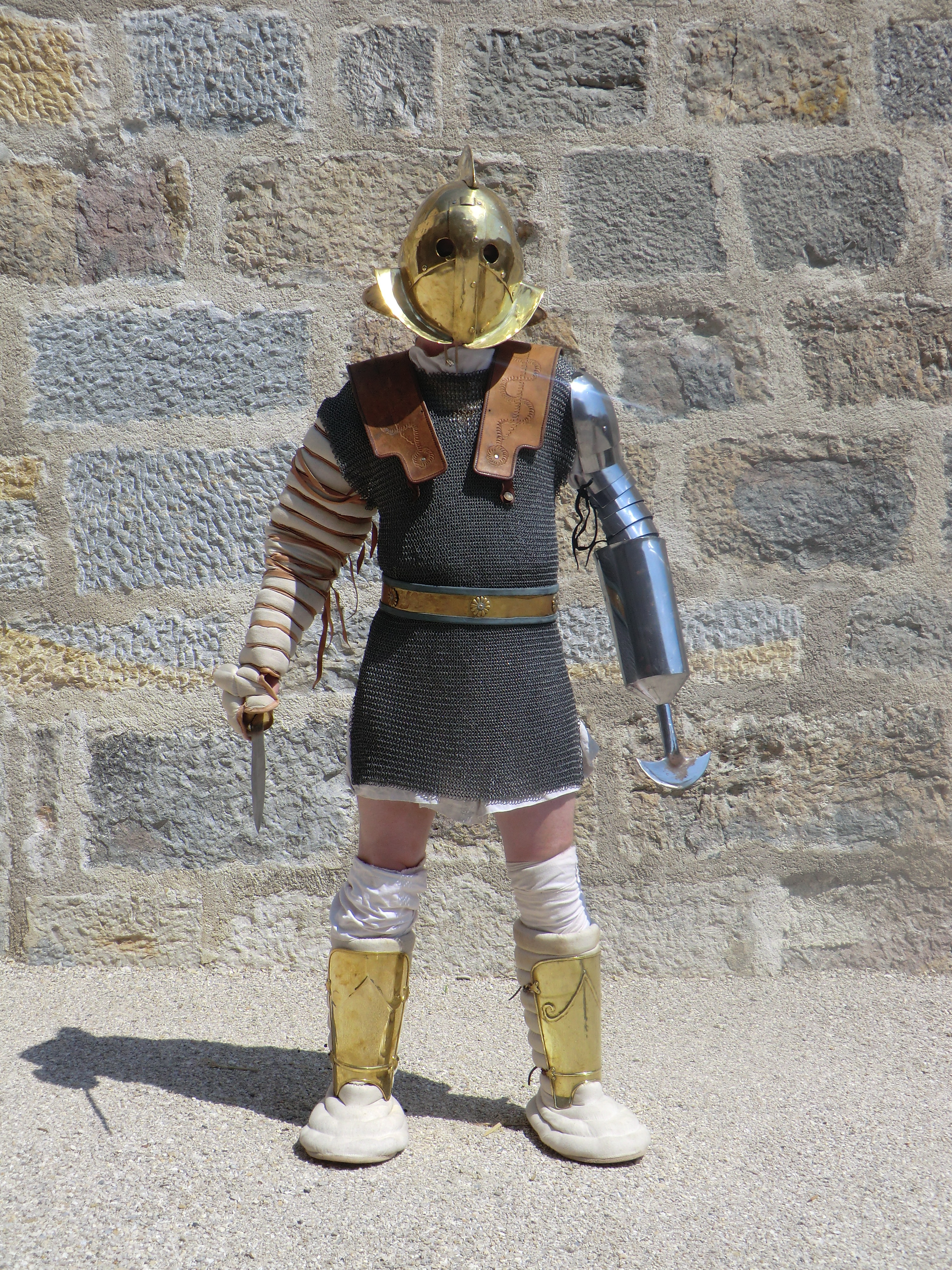 photo représentant un scissor avec son équipement reconstitué.